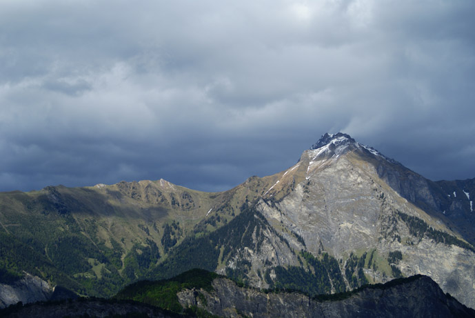 Falknis